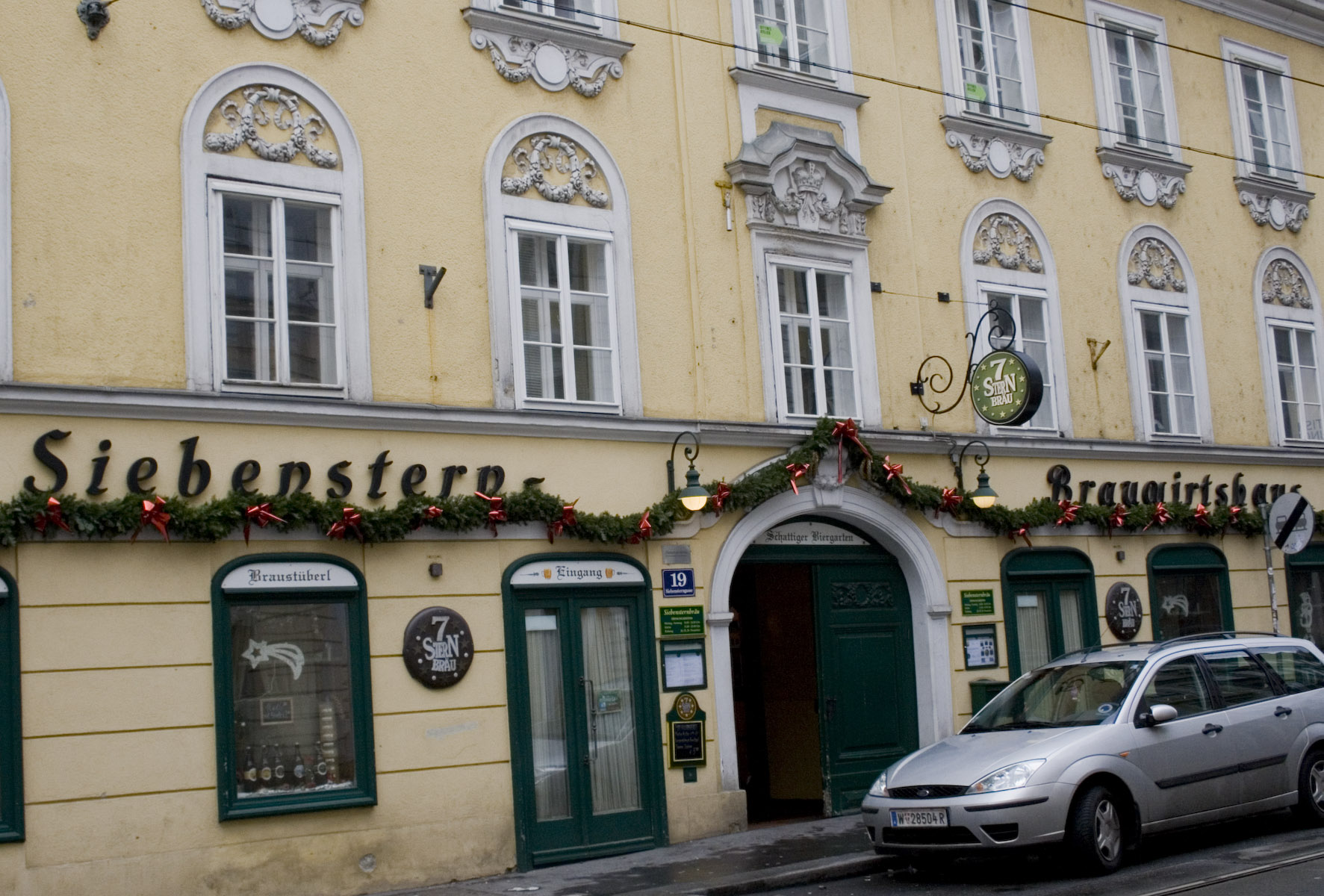 Neubau, Vienna.